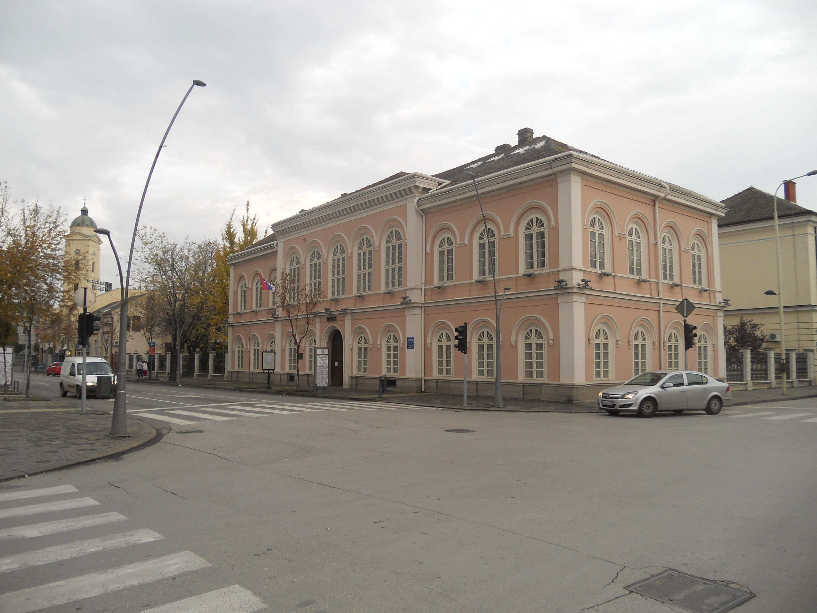 аутор Дарко Гајић